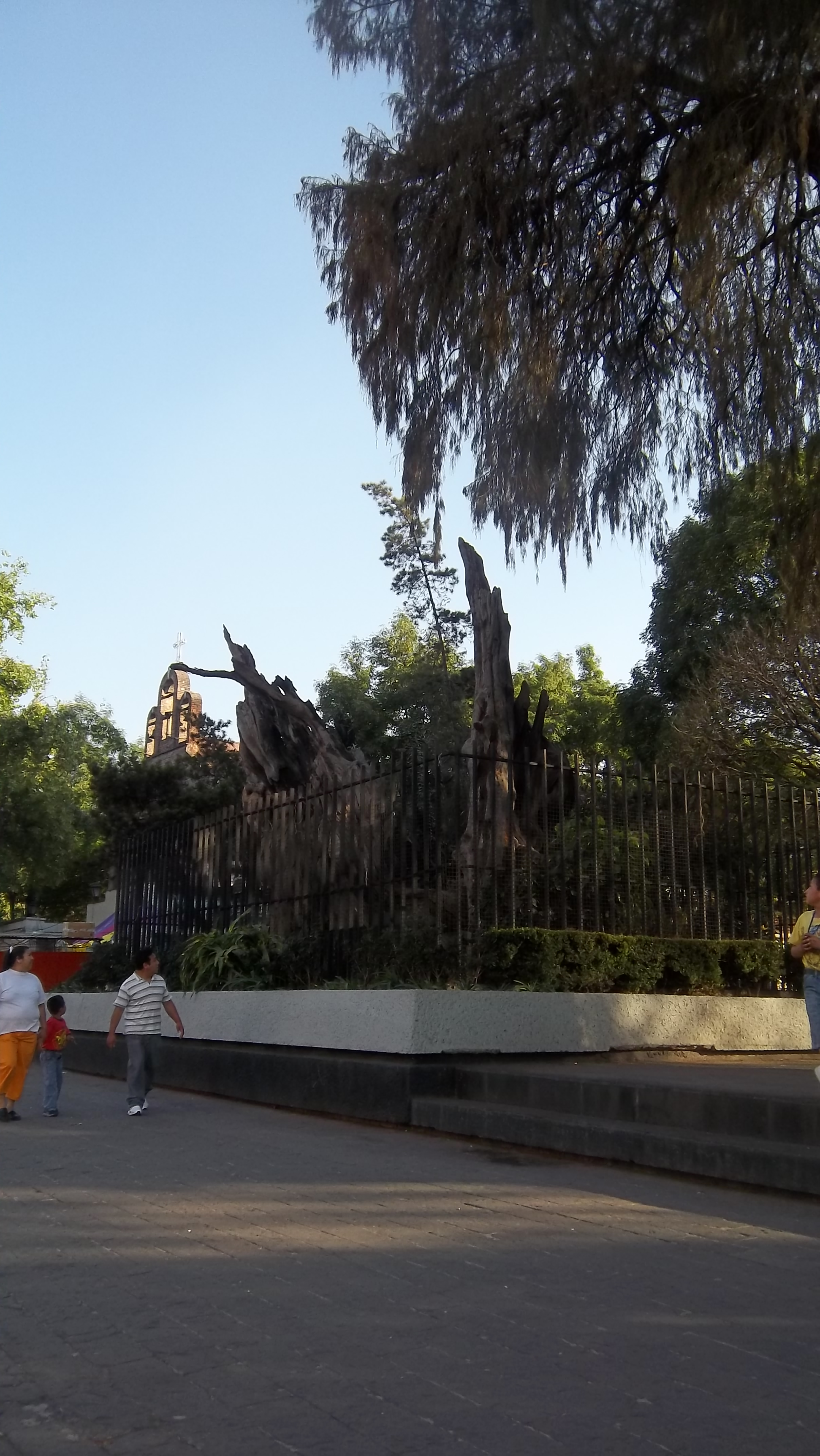 Ahuehuete al que la tradición considera el árbol de la Noche Triste, donde supuestamente Hernán Cortés lloró su expulsión de México Tenochtitlan en 1520.